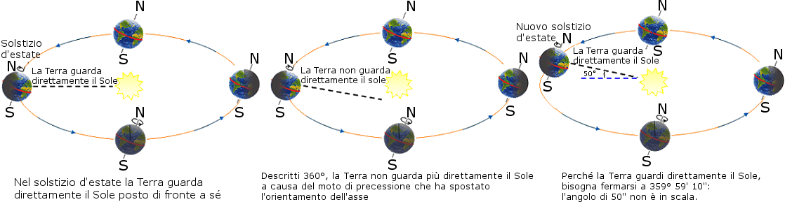 Anticipo del solstizio d'estate al trascorrere di un anno.